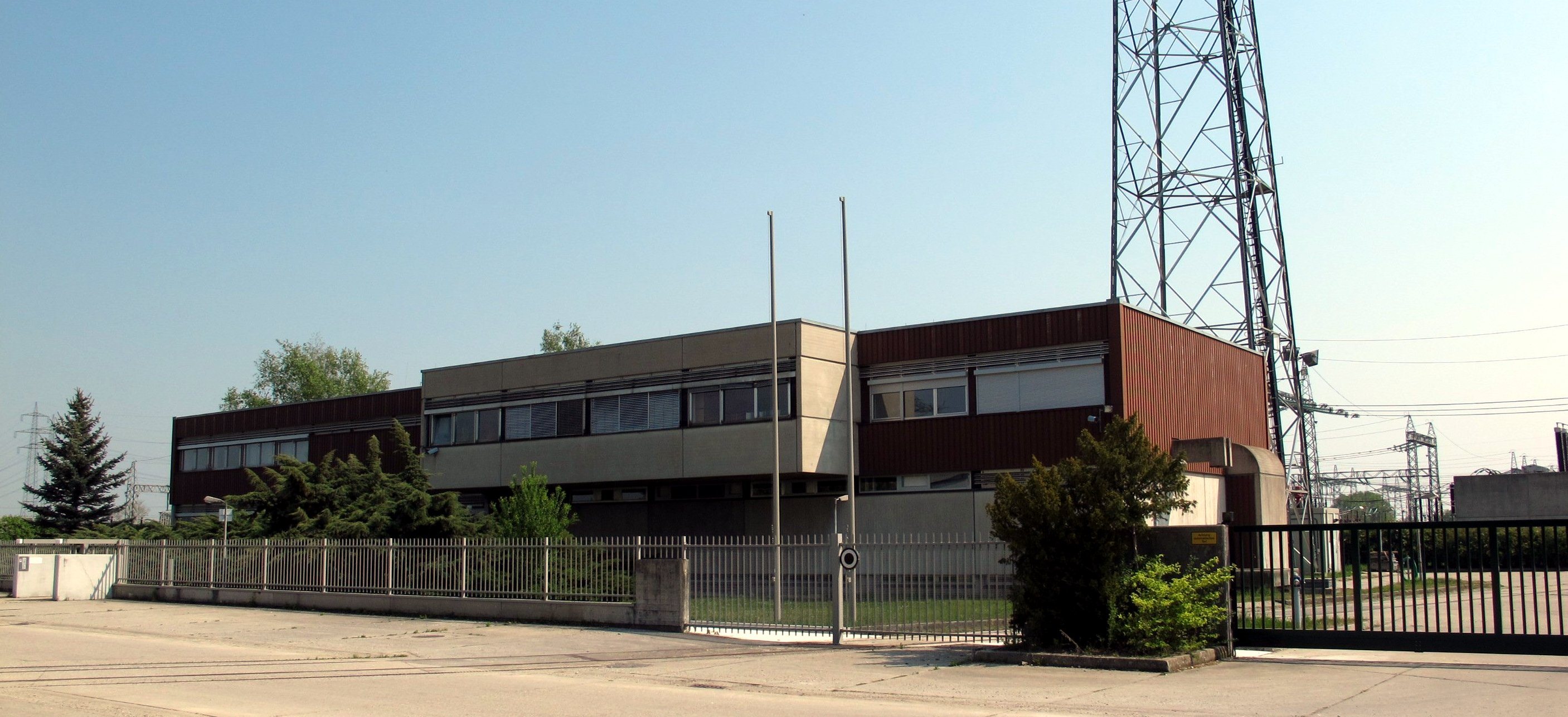 Umspannwerk Dürnrohr; Kontrollgebäude